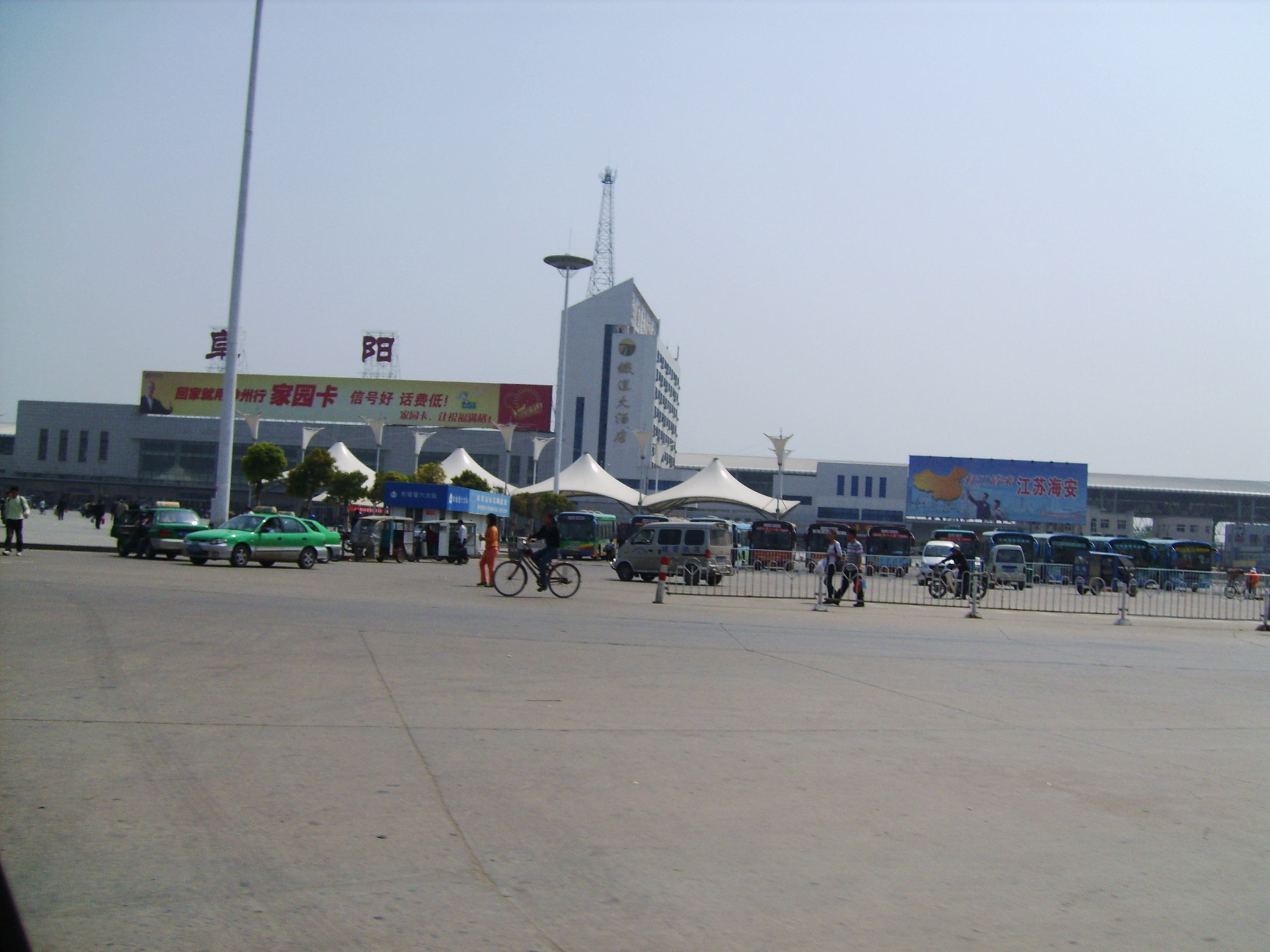 阜陽車站廣場前oeotwc